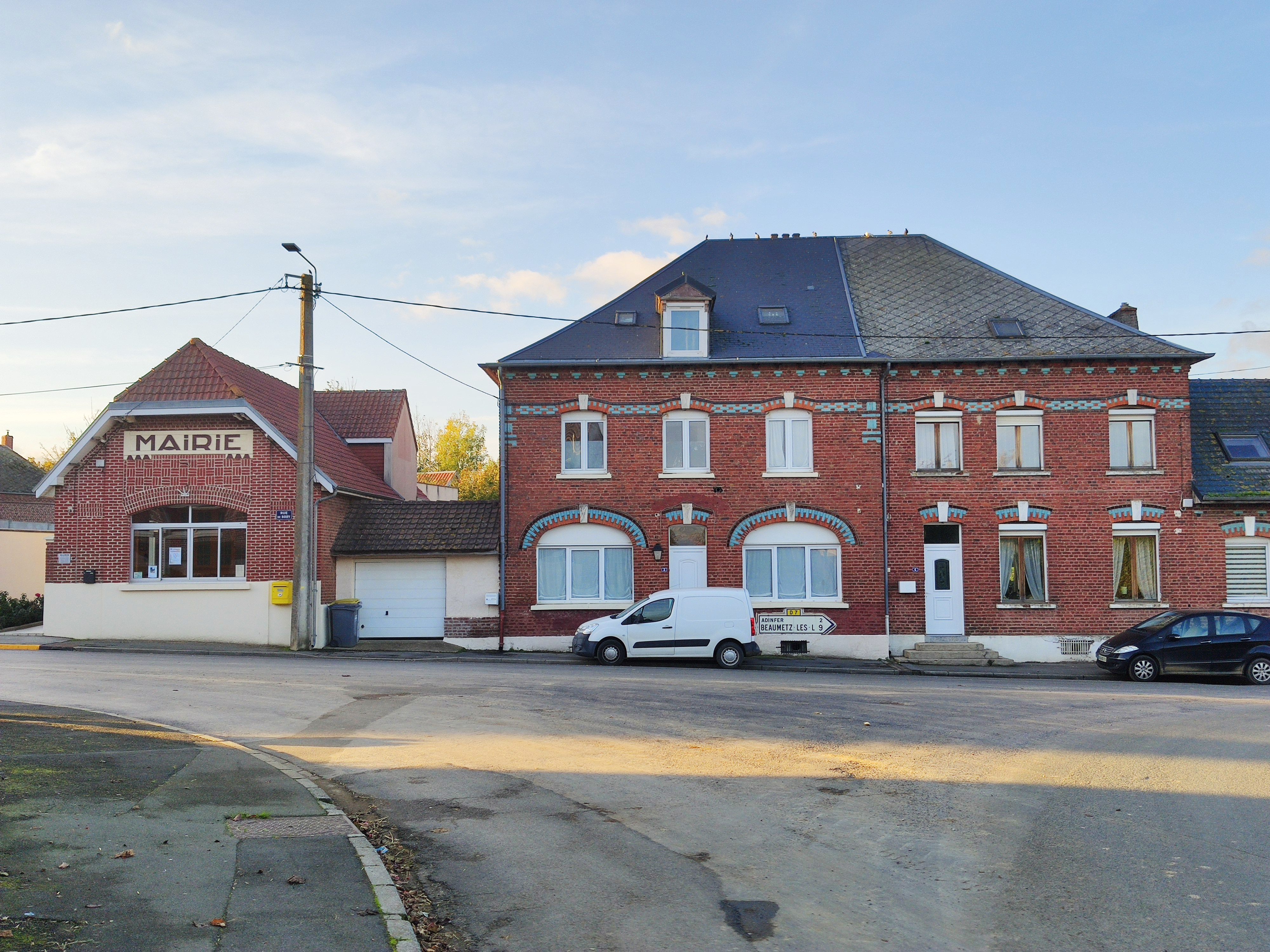 Douchy-lès-Ayette : Immeubles de la Reconstruction